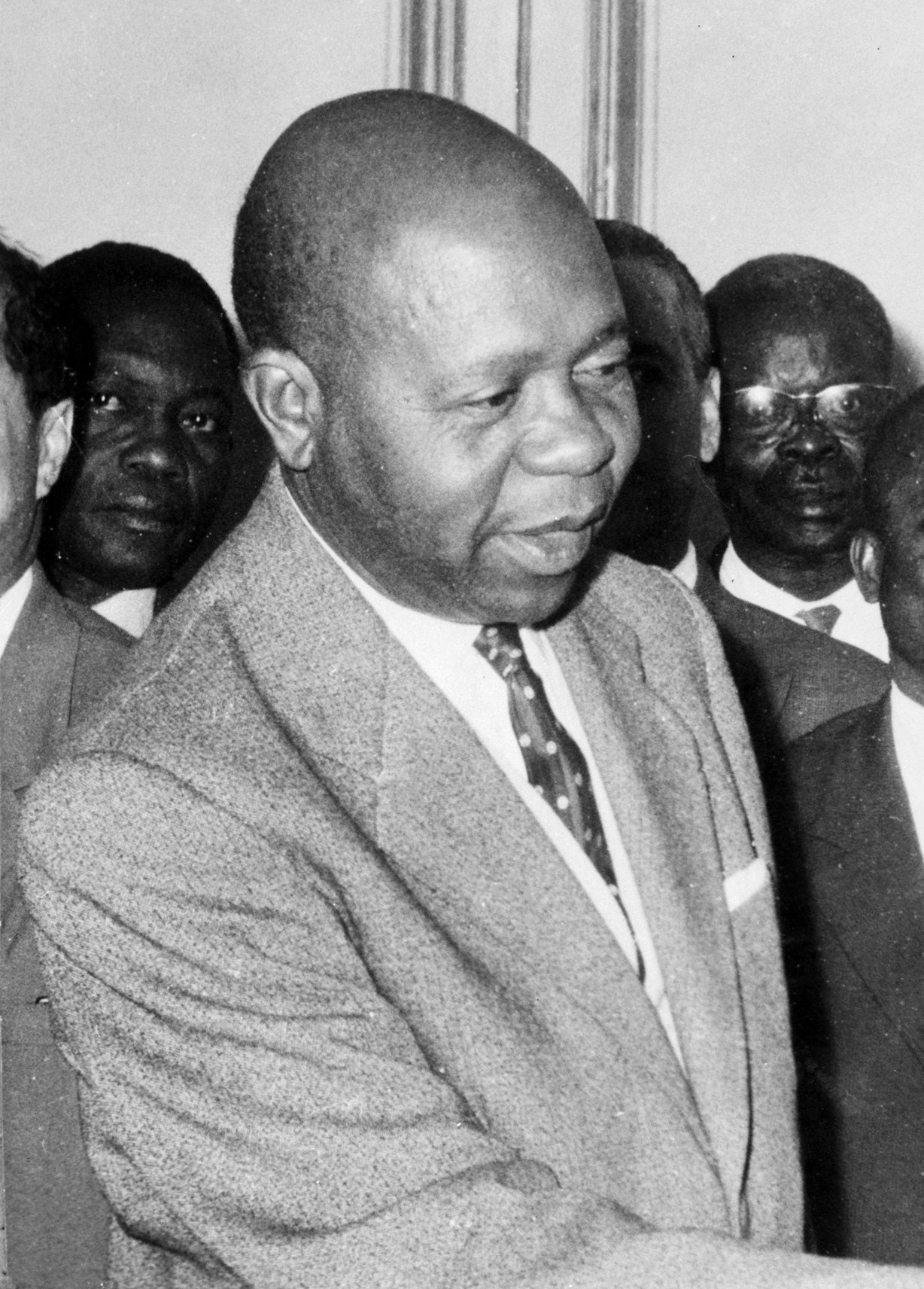 Léon M'ba